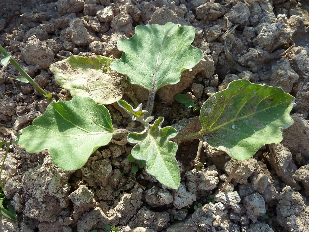 Solanum melongena (Berenjena) : Plantel joven - La Huerta, Albatera (Alicante, España).